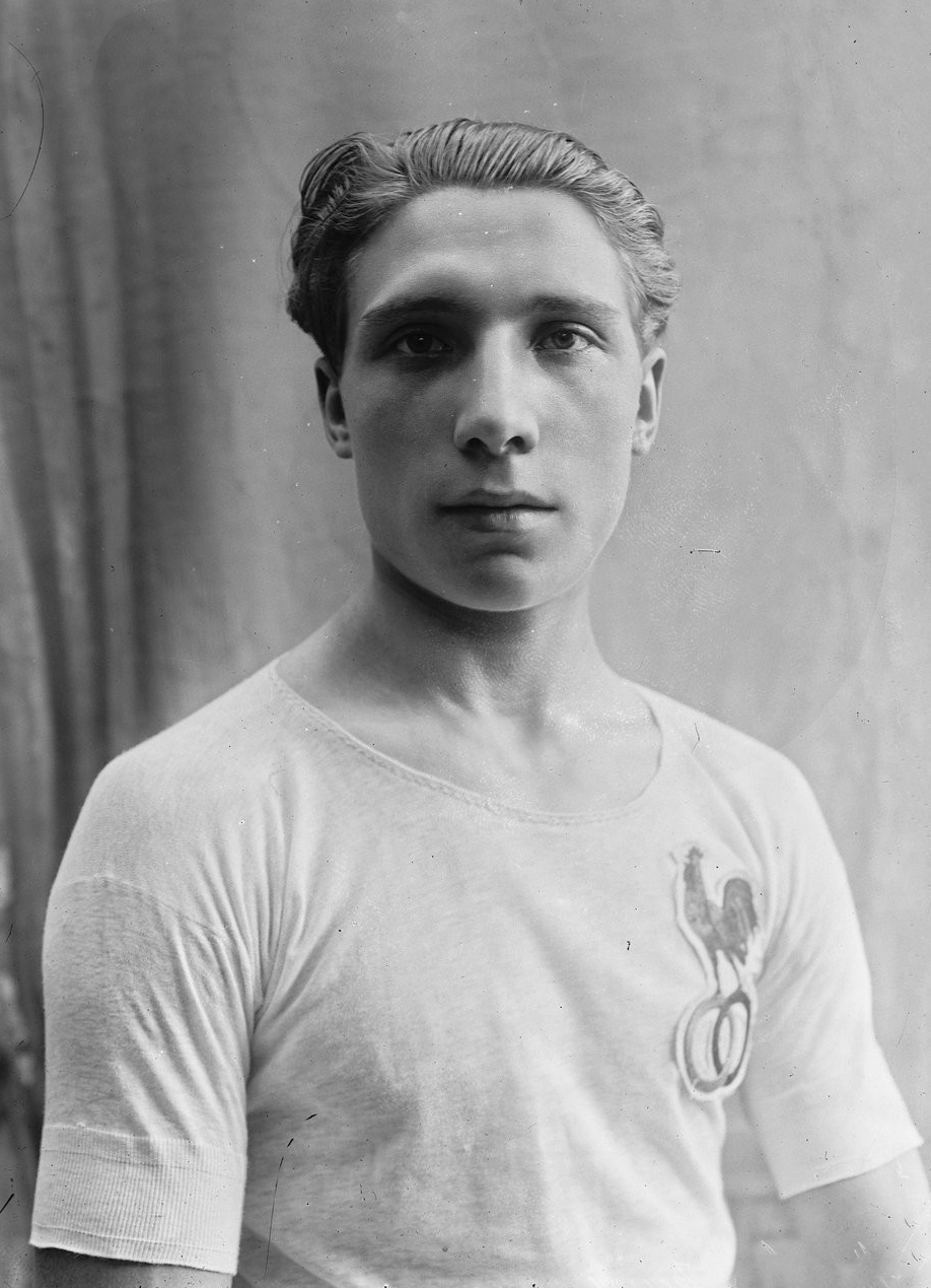 Mourlon jeune [i. e. André Mourlon] : [photographie de presse]